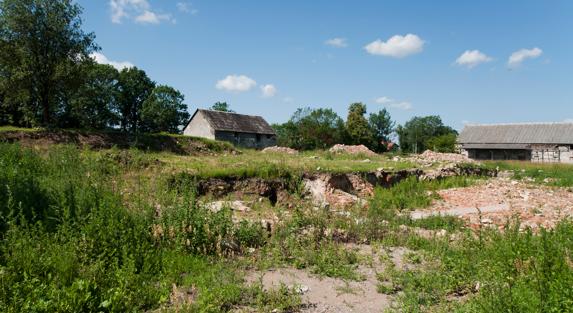 Dwór – część podziemna Rogów Sobócki, Sobótka